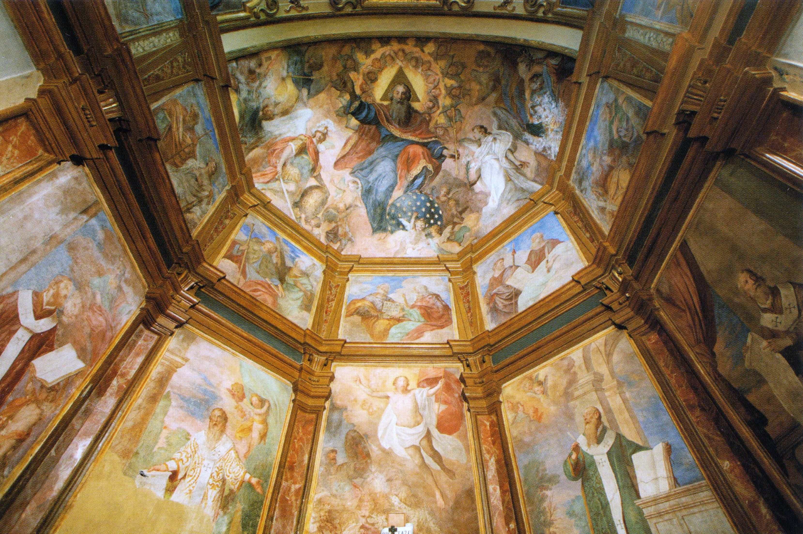 Affreschi dell'abside della Cattedrale di Piana degli Albanesi, Pietro Novelli, 1641-1644, Padre Eterno, Immacolata, San Giovanni Battista, Apostoli ed Evangelisti, San Nicola di Mira e Padri della Chiesa greca.